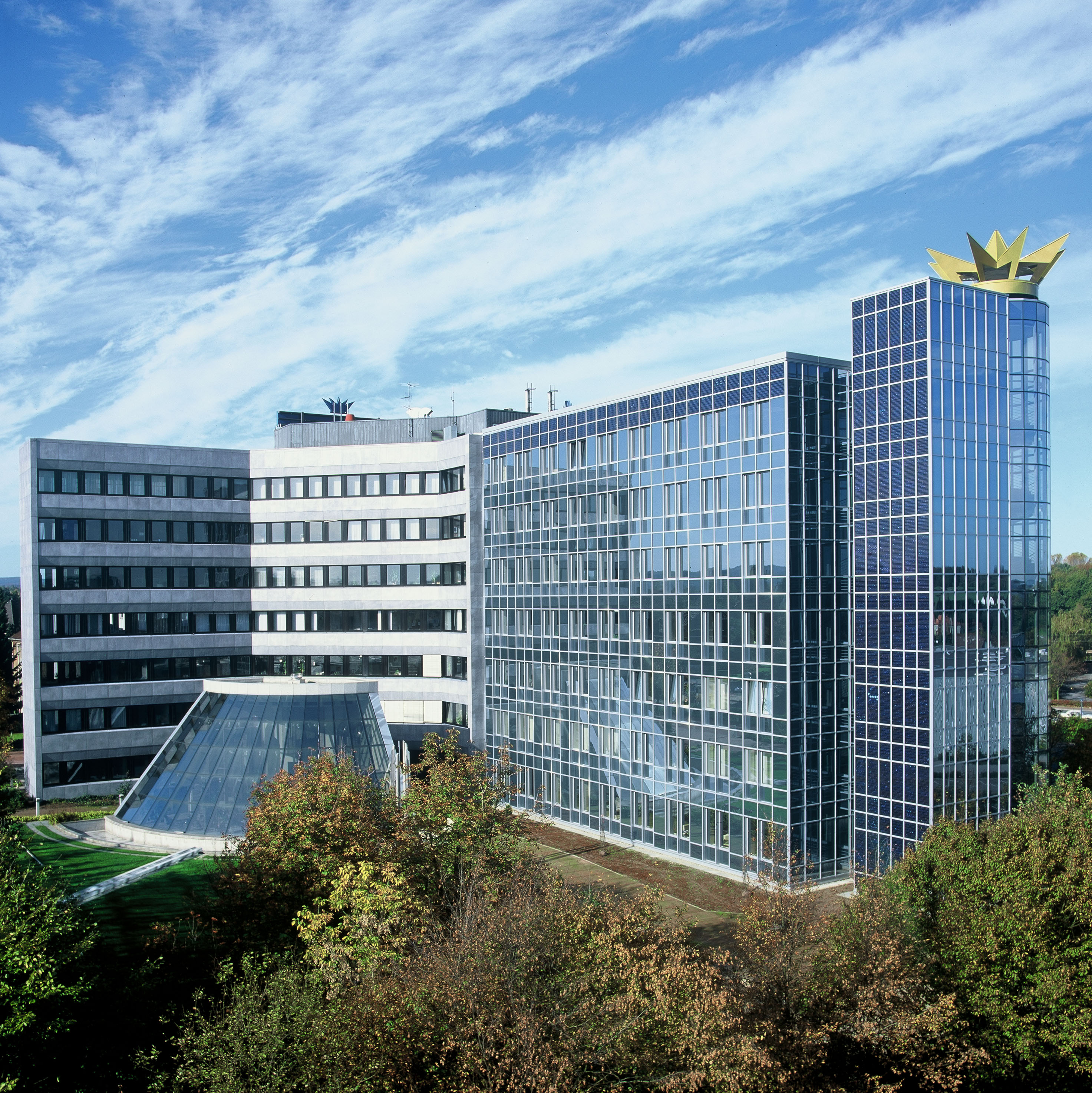 Unternehmenszentrale Schüco Bielefeld, Deutschland